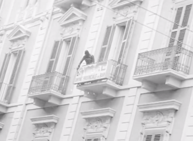 Un militante dell'autonomia distrugge l'insegna della CISNAL.